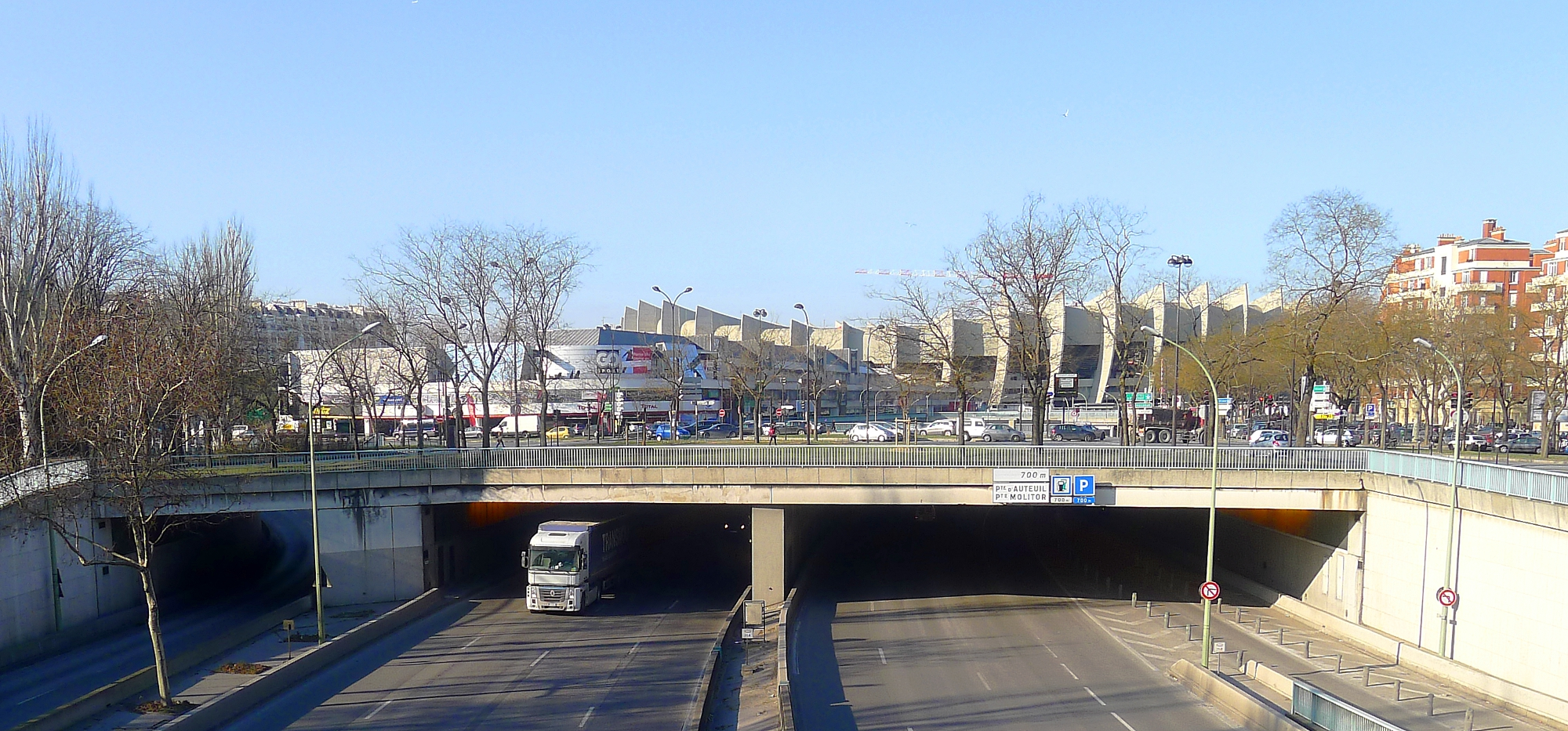 Boulevard périphérique (tunnel sous la porte de Saint-Cloud) - Paris XVI